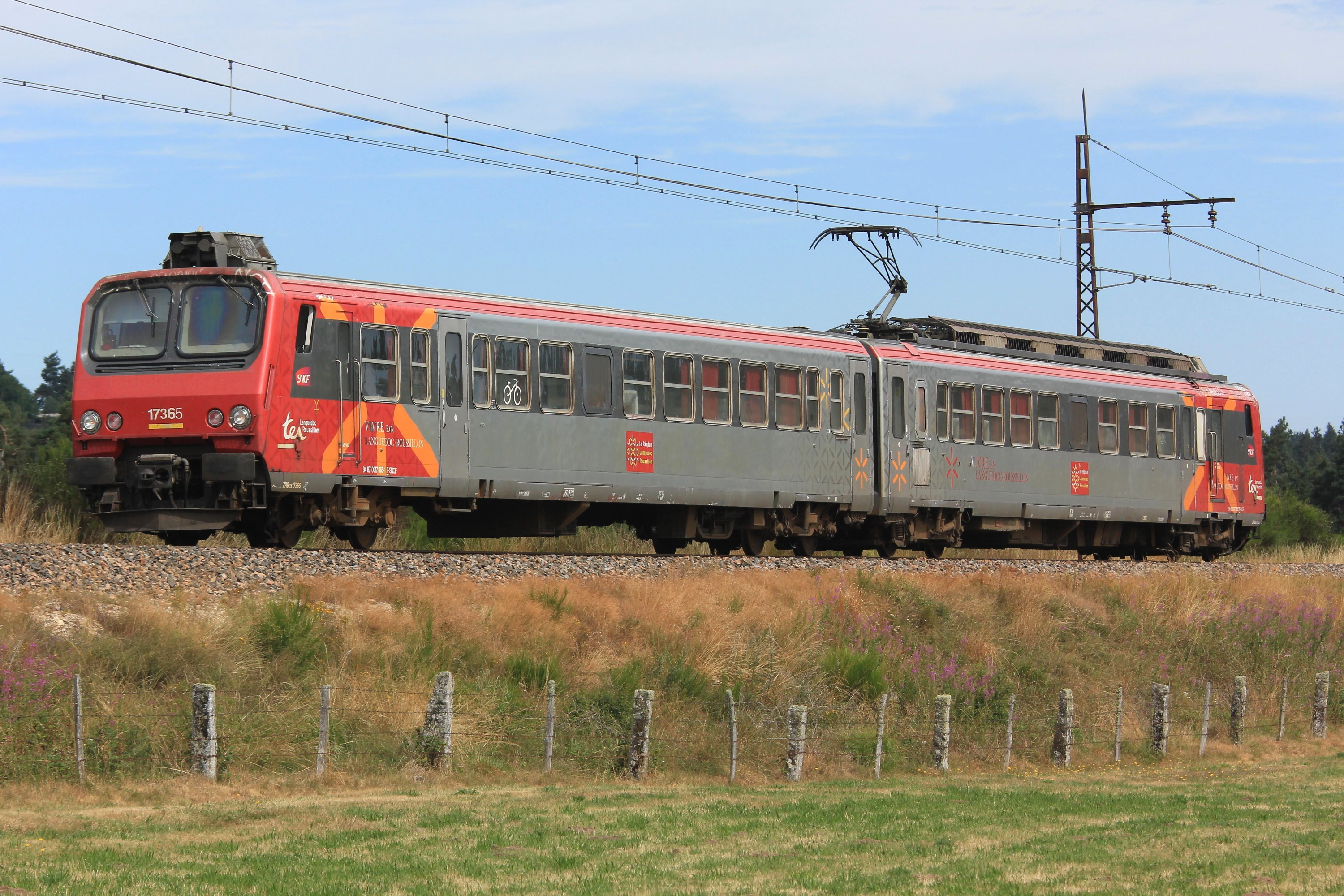 La Z 7365 assurant le TER n° 878957 (Saint-Chély - Béziers) passe à proximité du PN 116, sur la commune des Bessons, entre Saint-Chély et Aumont-Aubrac.